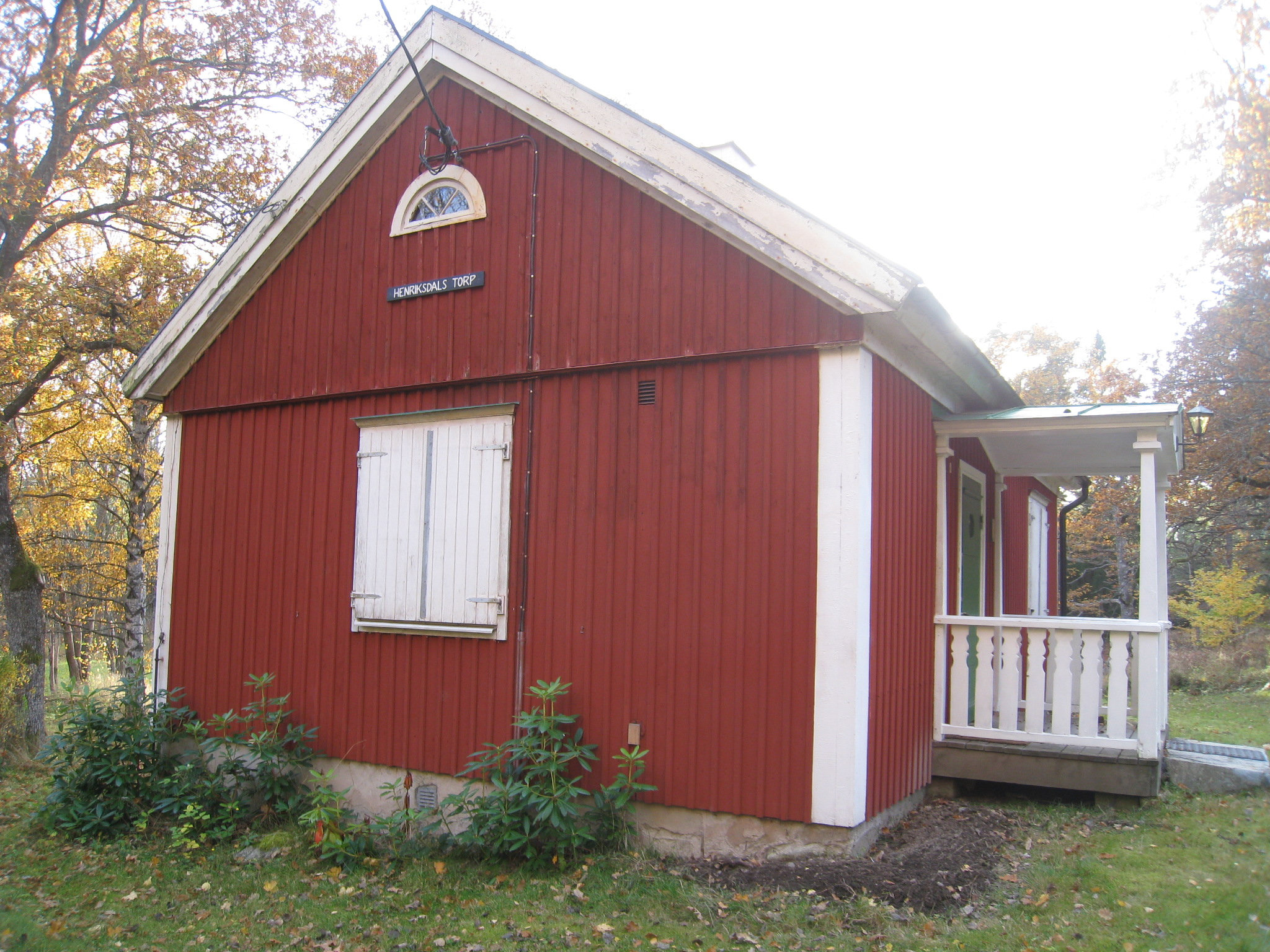 Nuvarande bostadshuset vid Henriksdals torp i Görvälns naturreservat, Järfälla. Östra gaveln med skylten "Henriksdals torp".